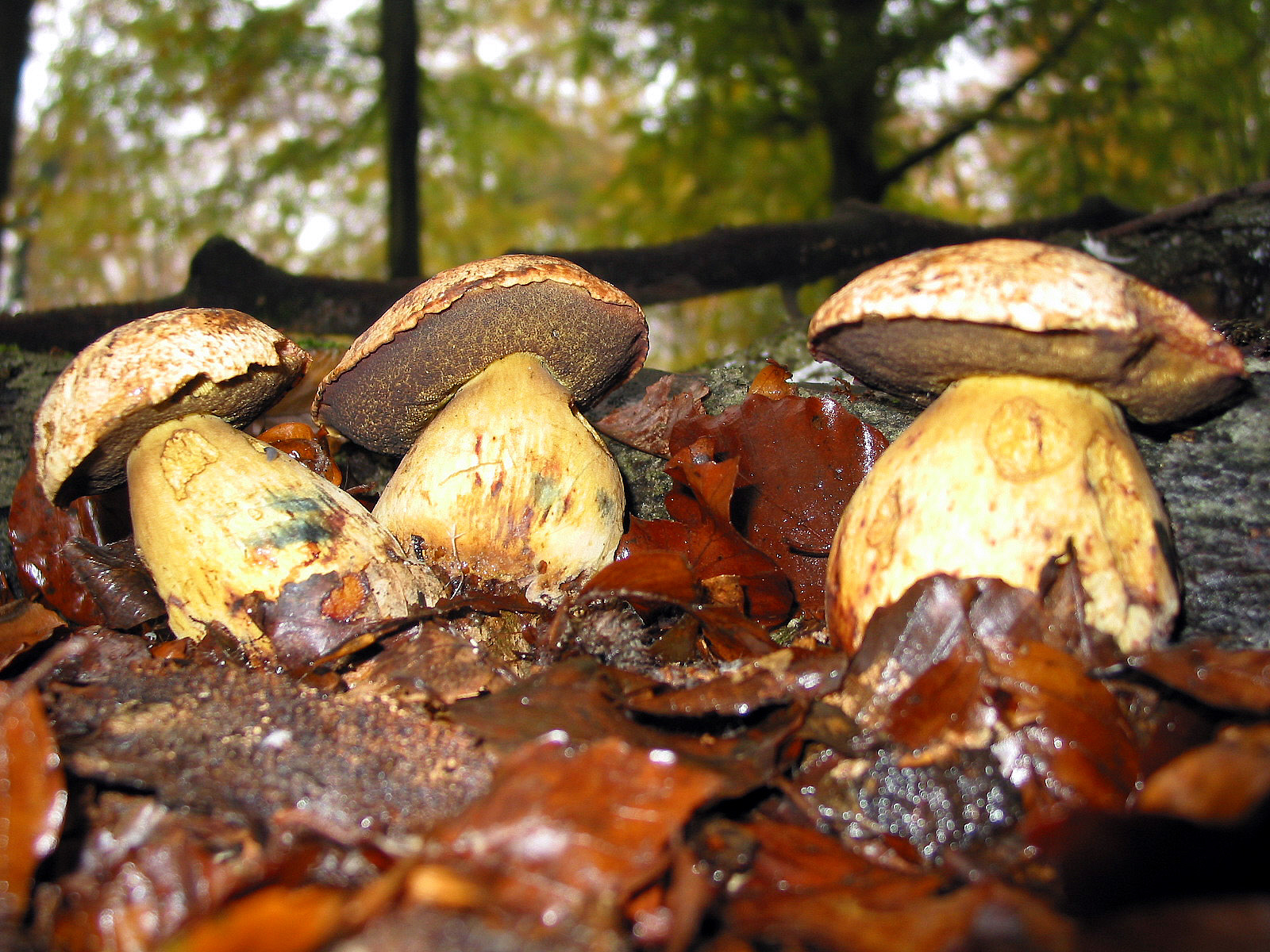 Boletus junquilleus (Belgique)/(Belgium), forêt de hêtres et de chênes./beeches and oaks forest.